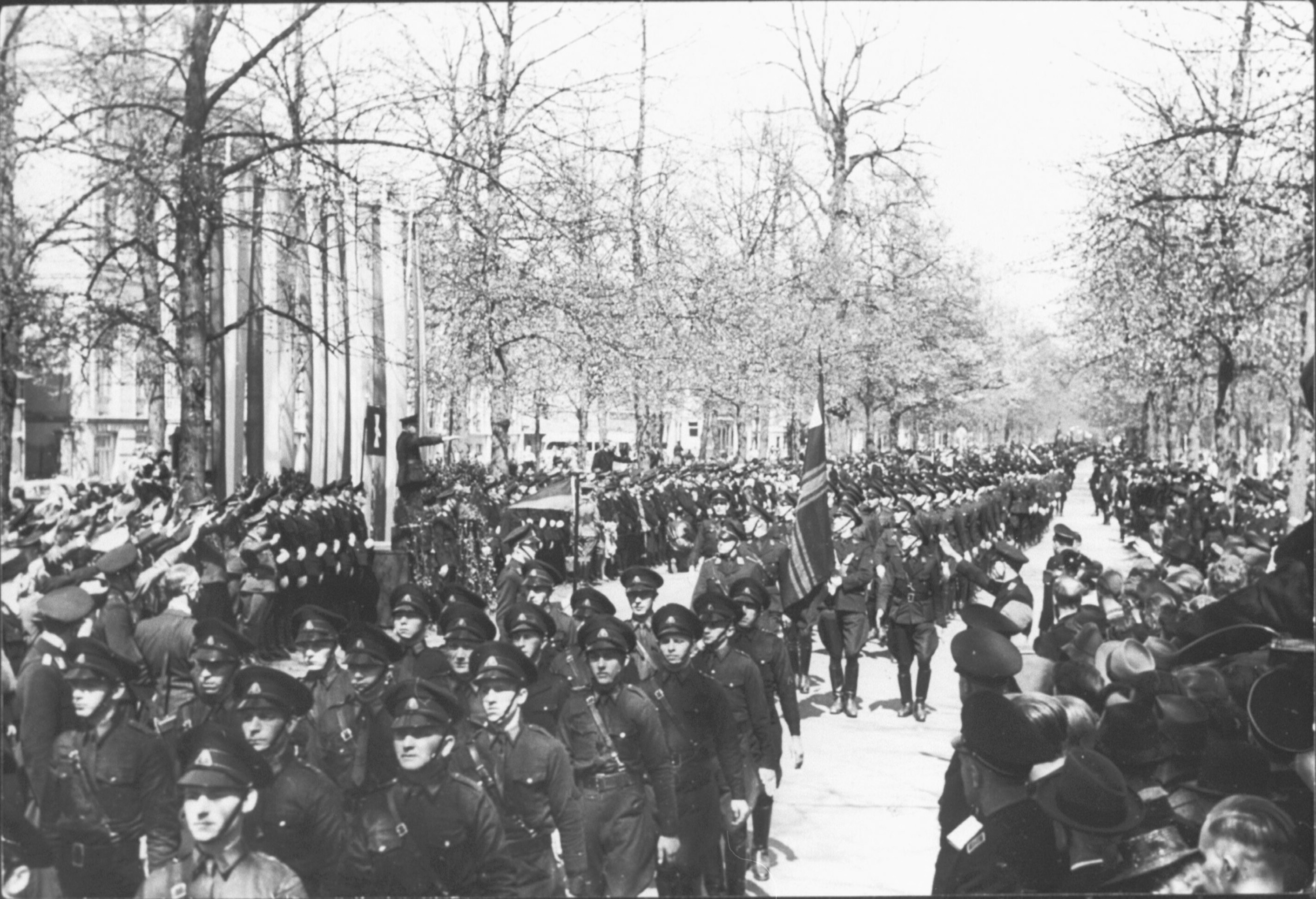 De WA (Weerbaarheidsafdeling) van de NSB viert de verjaardag van Mussert aan de Maliebaan in Utrecht. Deze foto is afkomstig uit het archief van de Fotodienst der NSB.